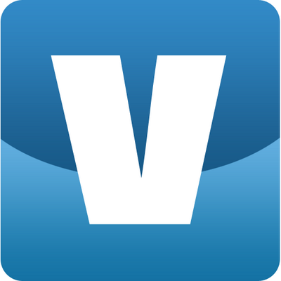 vavel logo